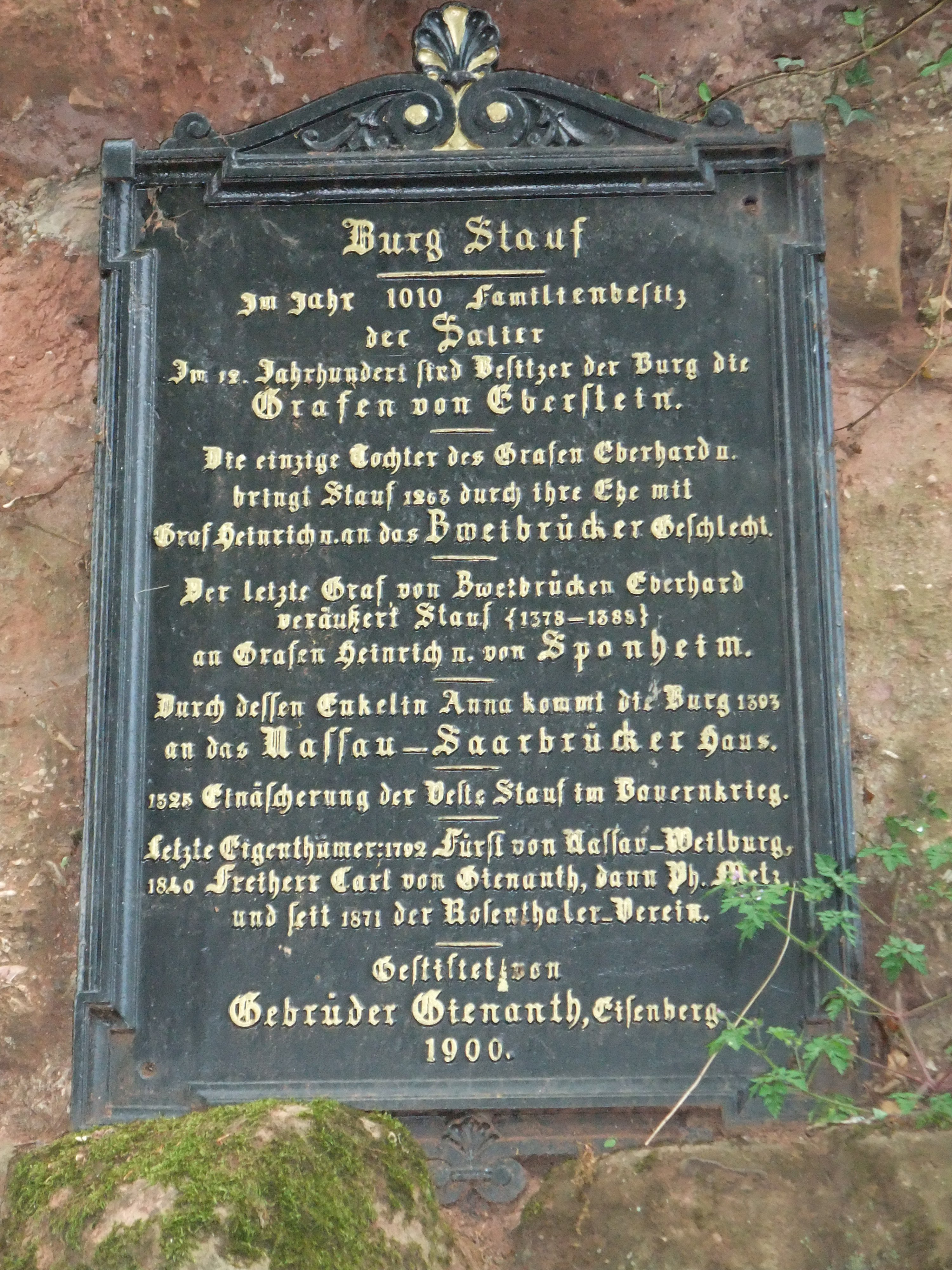 Inschrift-Tafel an der Burgruine Stauf bei Eisenberg (Pfalz)